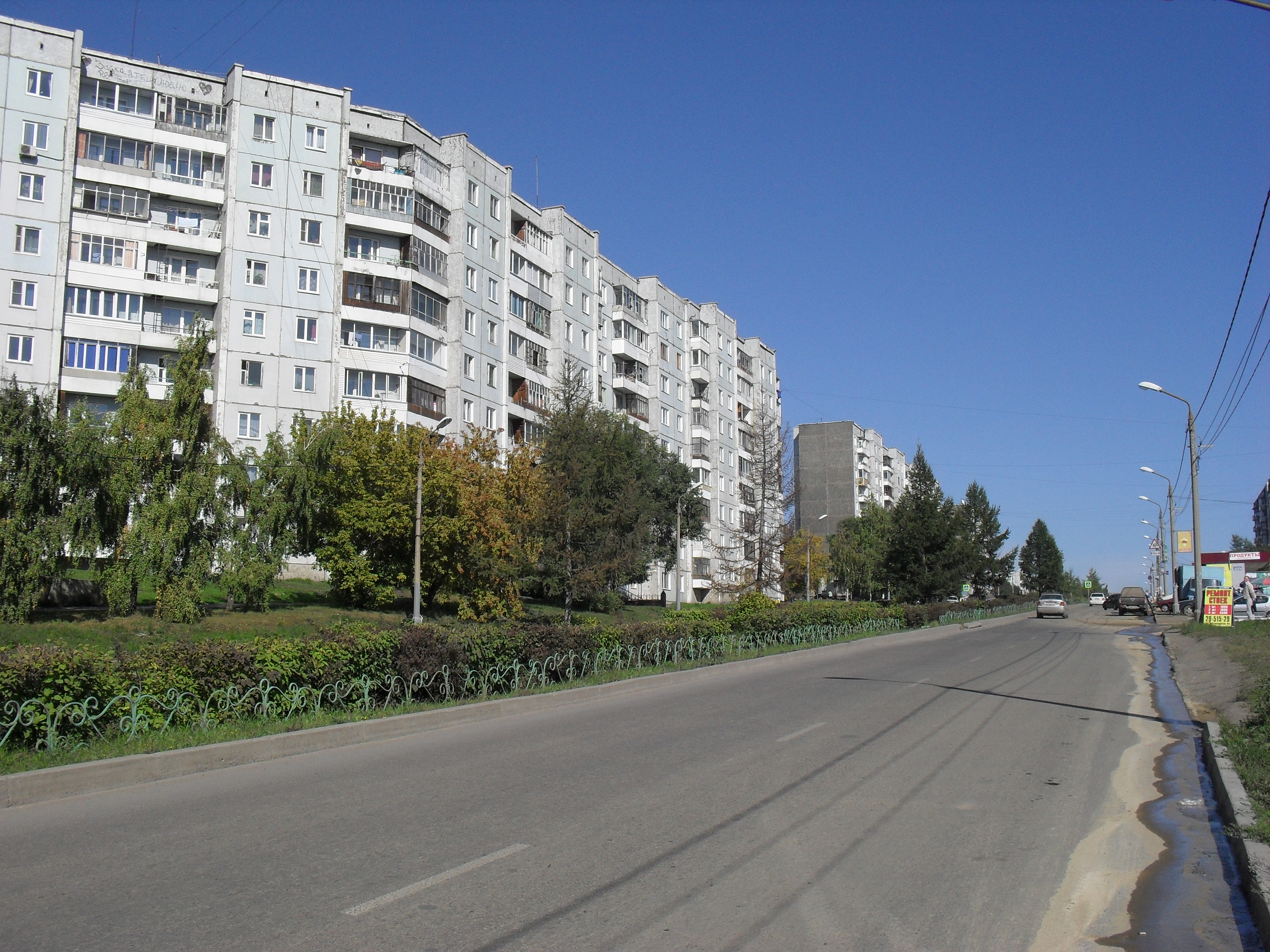 Ул. 60 лет СССР, мкрн Солнечный, Красноярск